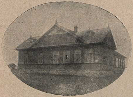 Беларуская (тарашкевіца): Шацак (Šacak), Зарэчча (Zarečča). Школа